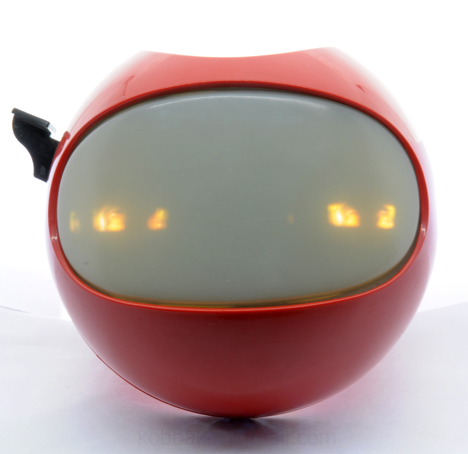 GAF View-Master Model K: (Space Viewer, EyeBall Viewer) red ~1975-1984